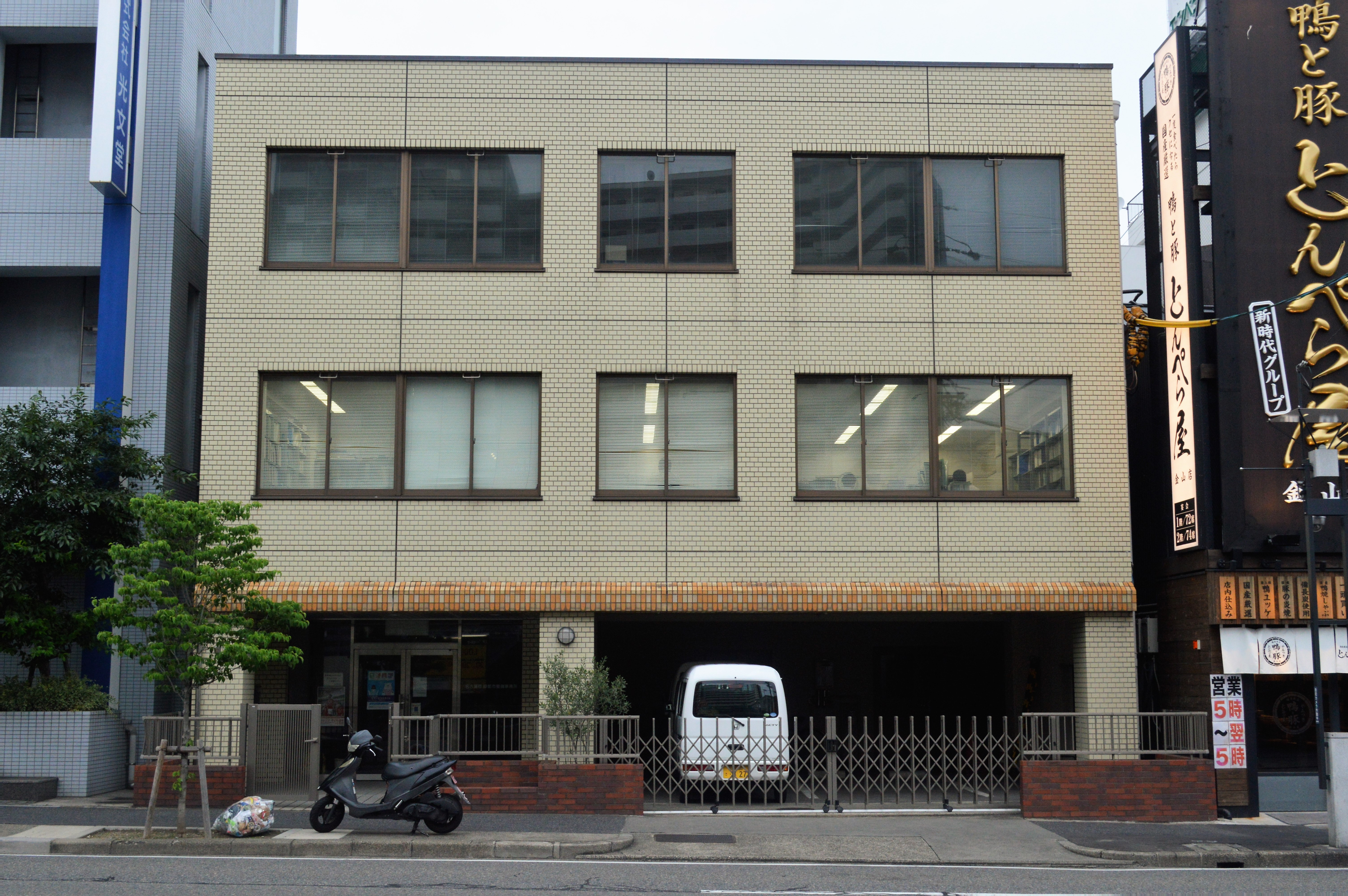 名古屋市中区金山2丁目の名古屋市緑都市整備事務所。かつてこの建物には名古屋都市センターが入っていた。